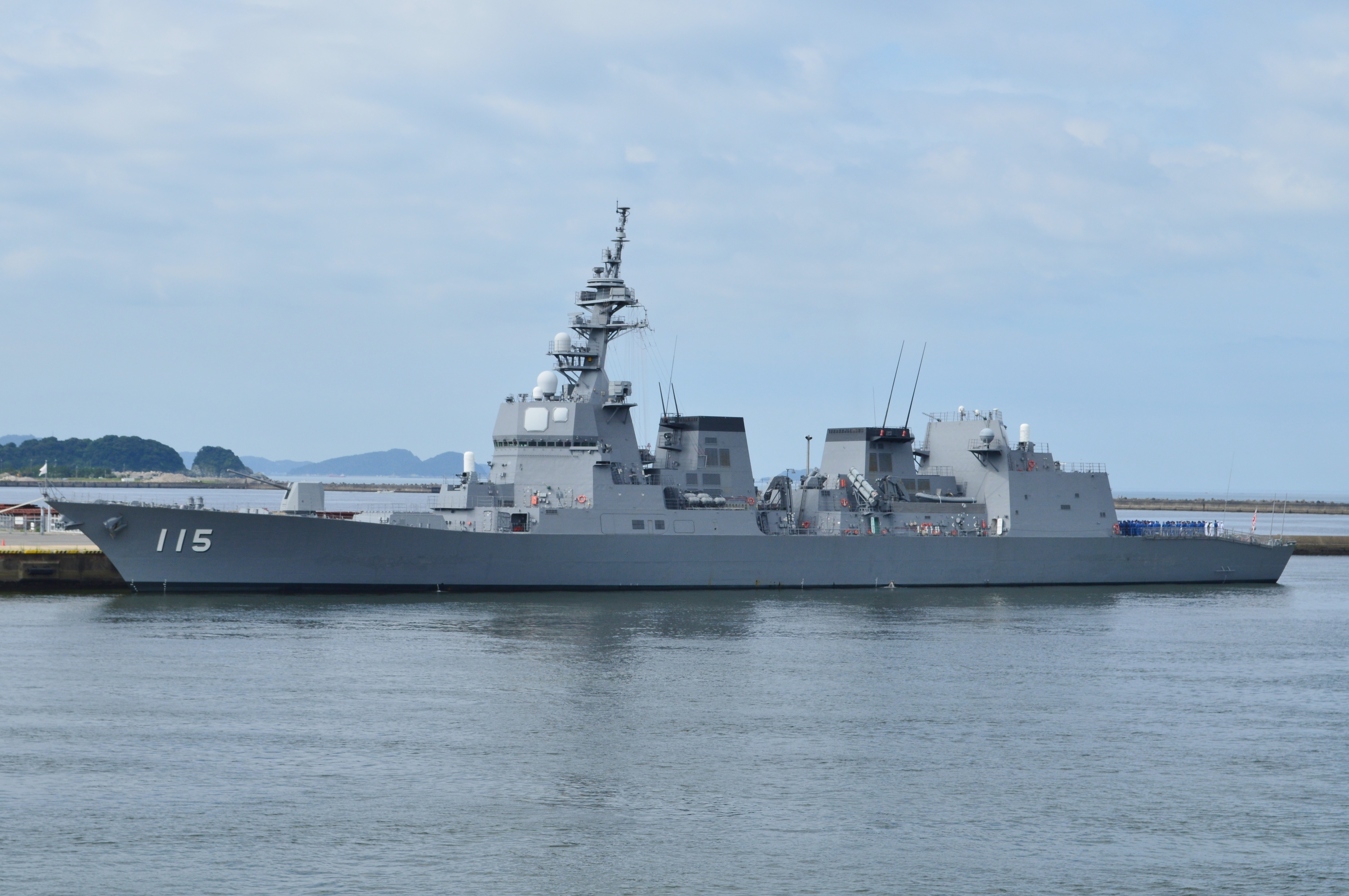 あきづき (和歌山港にて)